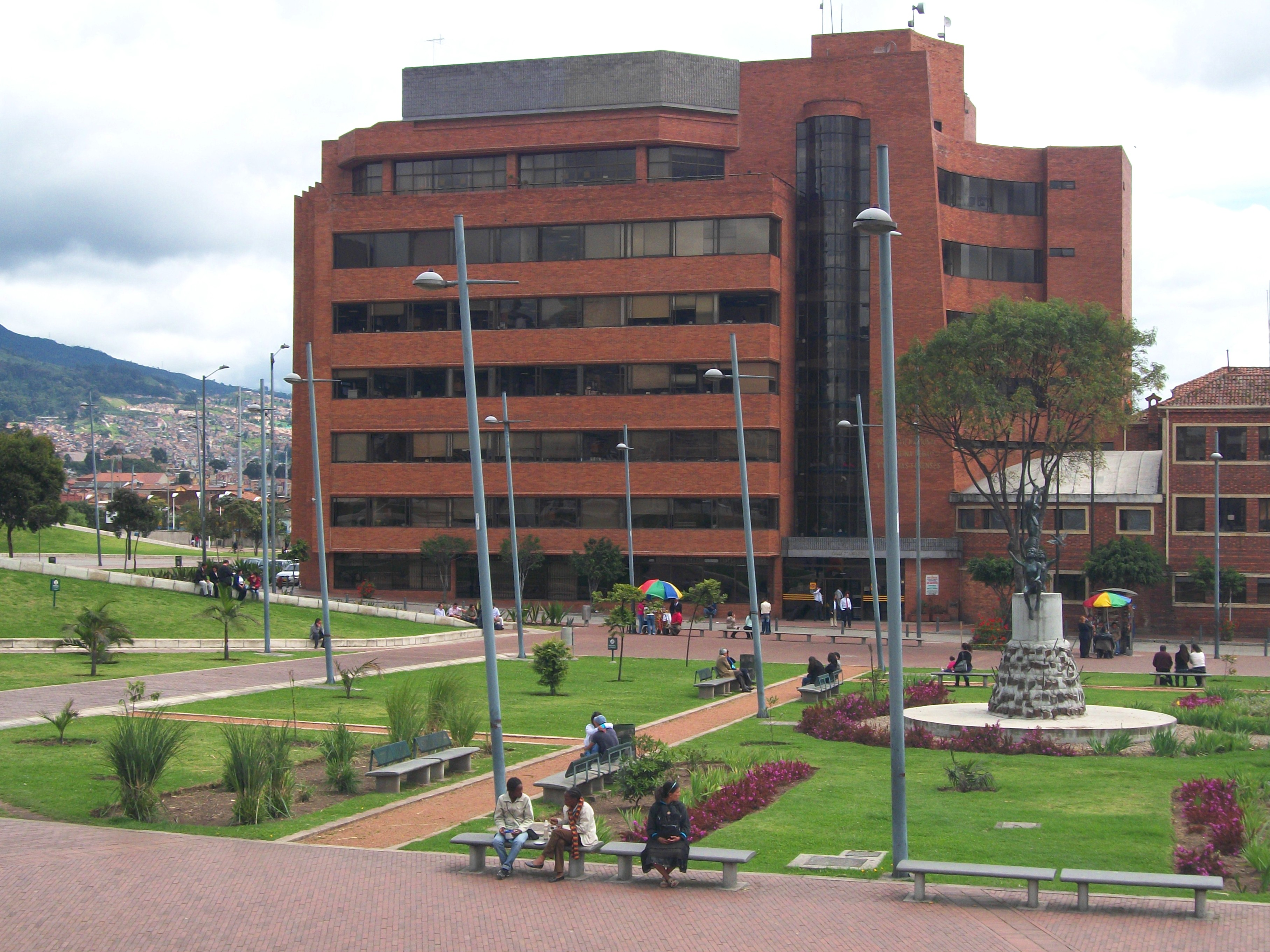 Instituto Nacional de Medicina Legal en el parque Tercer Milenio, Bogotá.